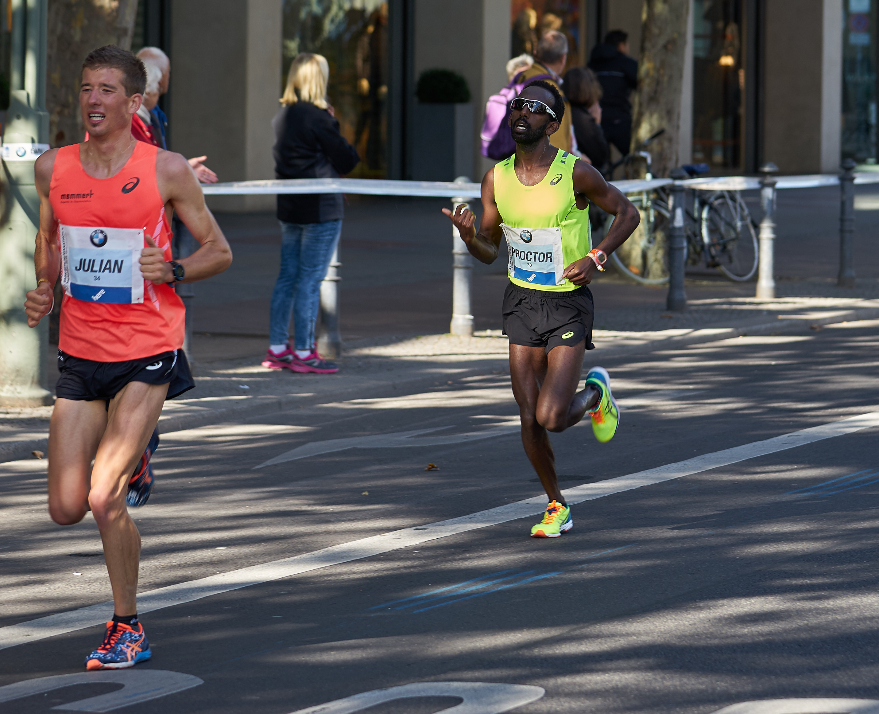 Berlin Marathon 2015 Flügel, Julian (GER), Proctor, Gabe (USA)